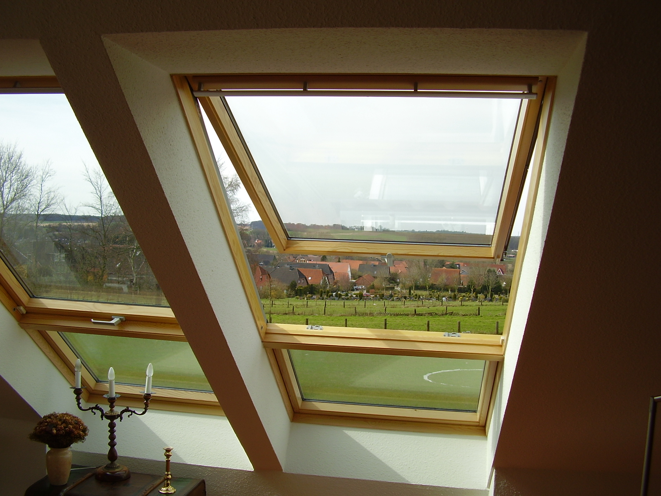 Velux-Dachfenster